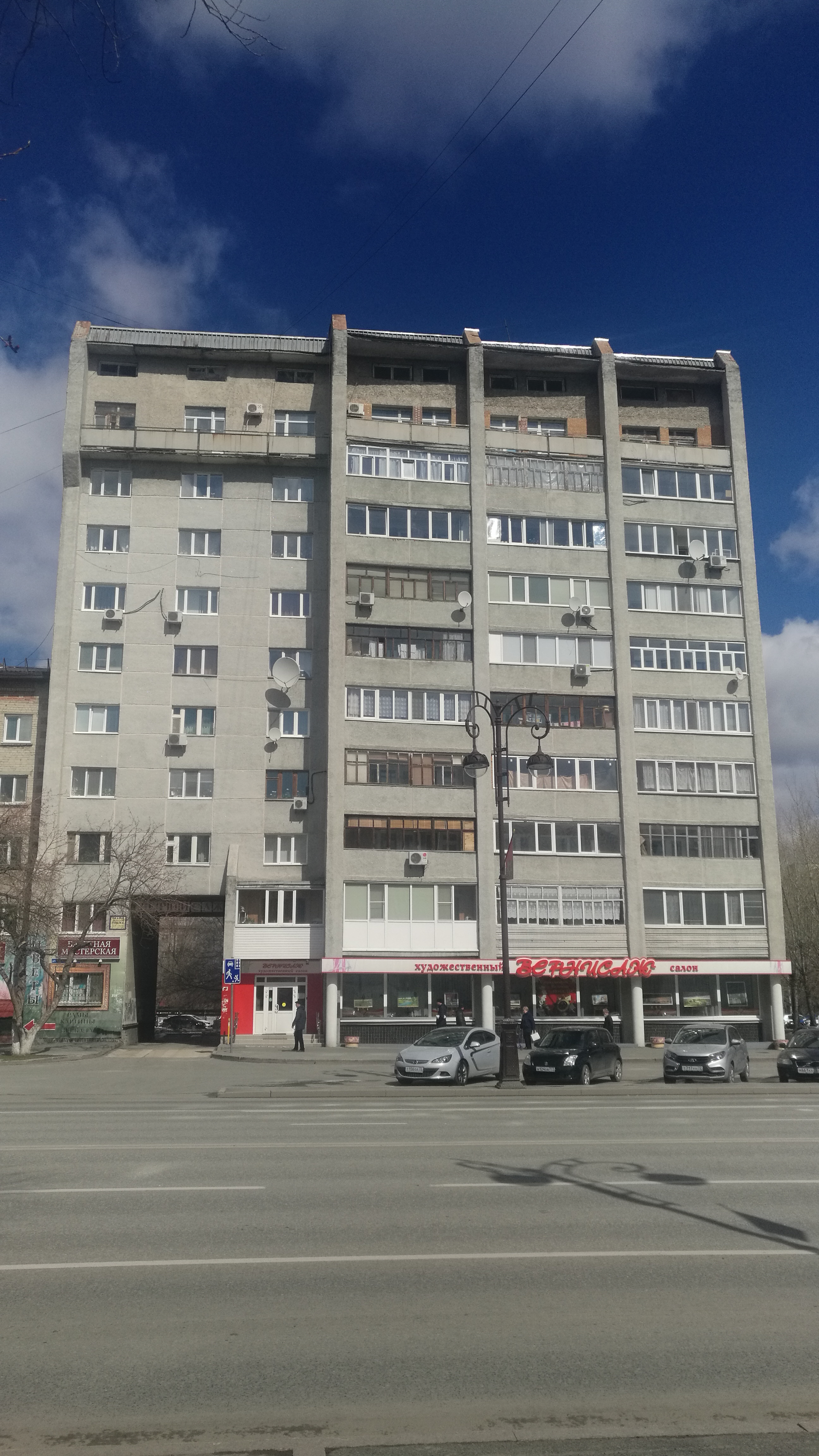 Strato Respubliko. Tjumeno, Rusio.